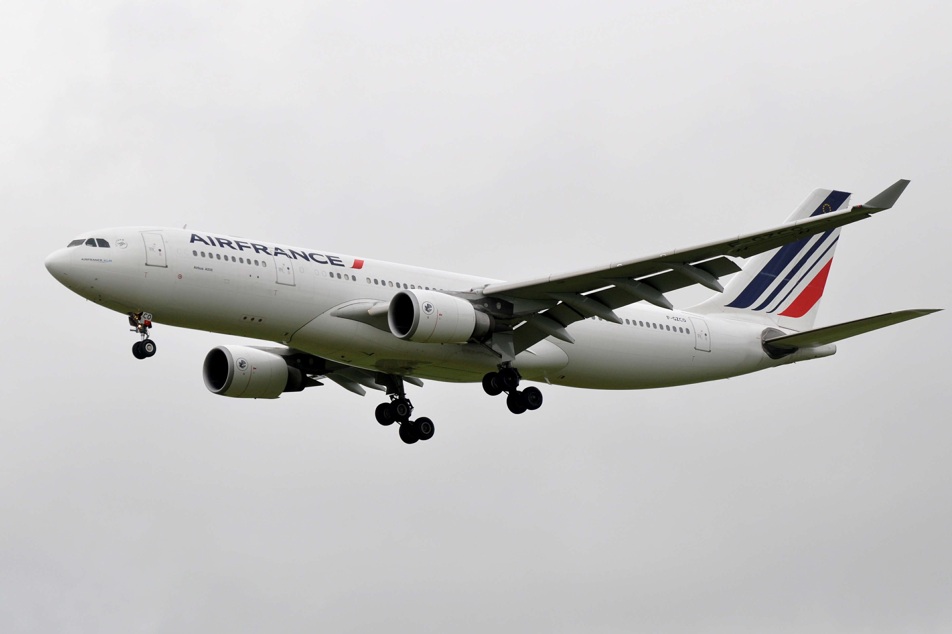 MSN 657 A330-203 AIR FRANCE CDG